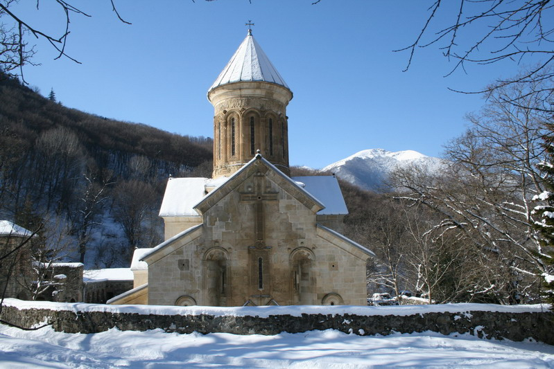 ქვათახევის სამონასტრო კომპლექსი, თბილისიდან 55 კმ-ში, კასპის რაიონში მდებარეობს. ტაძარი XII საუკუნისაა, და პლატონ იოსელიანი მის აღმშენებლად დავით აღმაშენელს მიიჩნევს და აგების წლადაც 1126 წელს ასახელებს, თუმცა სხვა წყაროებში, ტაძრის მშენებლობა თამარის სახელს უკავშირდება. გადმოცემით, ტაძრის საძირკველში ღვთისმშობლის სამოსლის მცირე ნაწილია ჩატანებული და ტაძარიც მის სახელს ატარებს. ტაძარში დაცულია სიწმინდეები: წმინდა იოანე ნათლისმცემლის წმინდა ნაწილი და ღვთისმშობლის მიძინების სასწაულთმოქმედი ხატი. ქვათახევი ქართლის უმთავრეს მონასტრად მიიჩნეოდა და მას დიდებულები ყოველთვის მფარველობდნენ. დაცულია მეფე ლაშა-გიორგის შეწირულობის სიგელიც ქვათახევისადმი... სავარაუდოდ 1389 წელს თემურ-ლენგს სასტიკად დაურბევია ქვათახევის მონასტერი, იქ მყოფთათვის ქრისტეს უარყოფა მოუთხოვია. მონასტრის ბინადარნი კი უდრეკად ყოფილან. შეუკრებია თემურ-ლენგს მონაზვნები, ბერები, მთელი სამღვდელოება, რომელთა რაოდენობა ერთ დიდი სოფელს აღემატებოდა, გამოკეტა ისინი ტაძარში და ცეცხლს მისცა იქაურობა. ტაძრის იატაკზე ეხლაც არისო დამწვარი სხეულების კვალი... აოხრებული ტაძარი მოგვიანებით ალექსანდრე დიდმა აღადგინა და მას შემდეგ, 1796 წლამდე მონასტერი იმდენად წმინდად მიიჩნეოდა, რომ იქ ქალს ფეხი არ დაუდგამს...